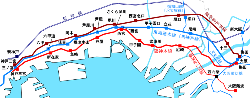 大阪 - 神戸（三宮）間で競合する鉄道の路線図